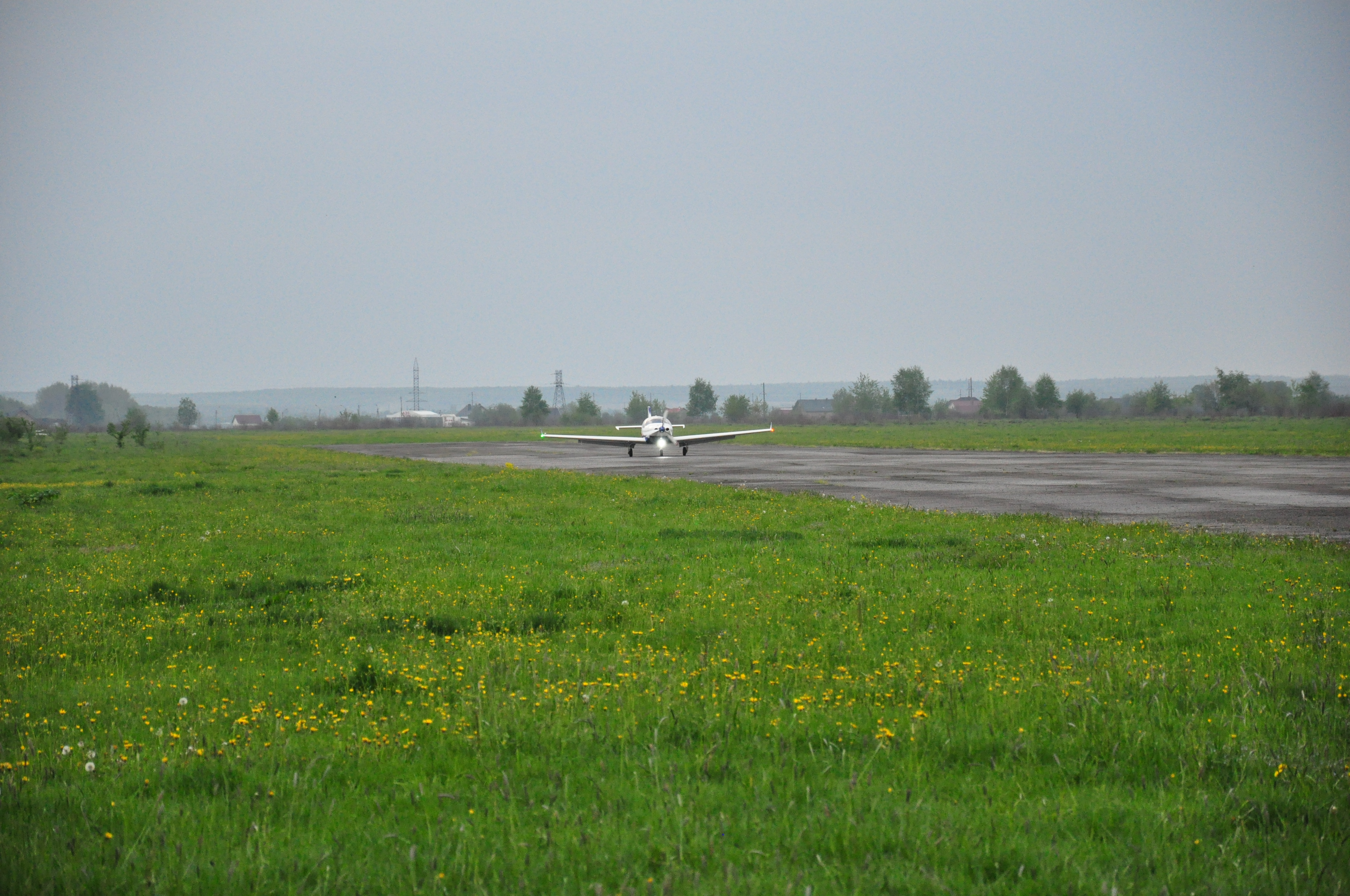 ЗПС спортивного аеродрому в м. Коломия